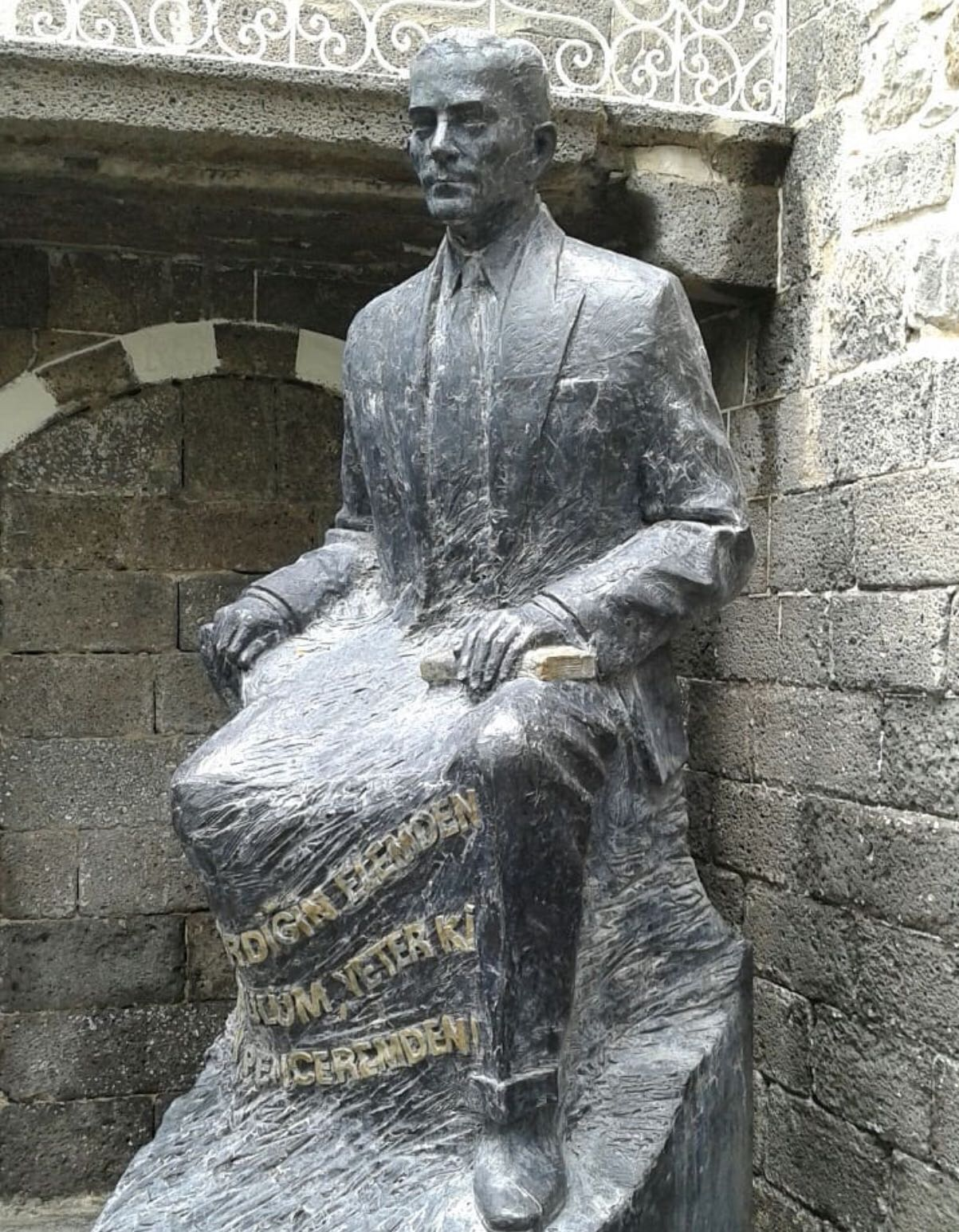 Cahit Sıtkı Tarancı (2 Ekim 1910, Diyarbakır - 12 Ekim 1956, Viyana), Türk şair, yazar ve çevirmen. Asıl adı Hüseyin Cahit olan Cahit Sıtkı Tarancı, Cumhuriyet dönemi Türk şiirinin önde gelen şairlerinden biridir.